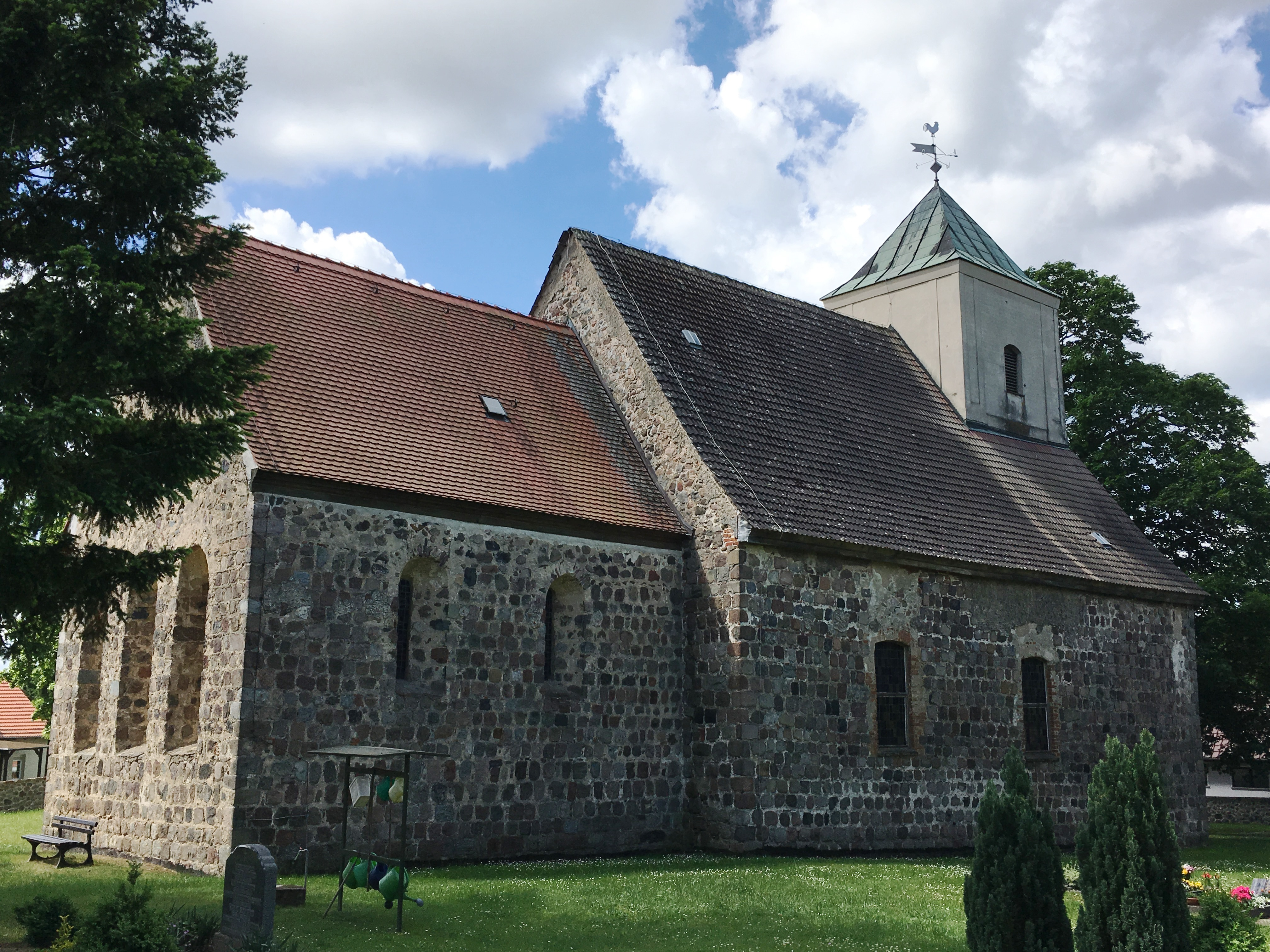 Die Dorfkirche Beerfelde ist eine Feldsteinkirche aus der zweiten Hälfte des 13. Jahrhunderts. Im Innern stehen unter anderem die Reste eines Altarretabels aus dem Jahr 1713, ein Kanzelkorb aus dem Jahr 1675 sowie eine Sauer-Orgel.